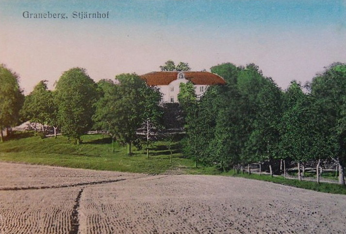 Granebergs herrgård